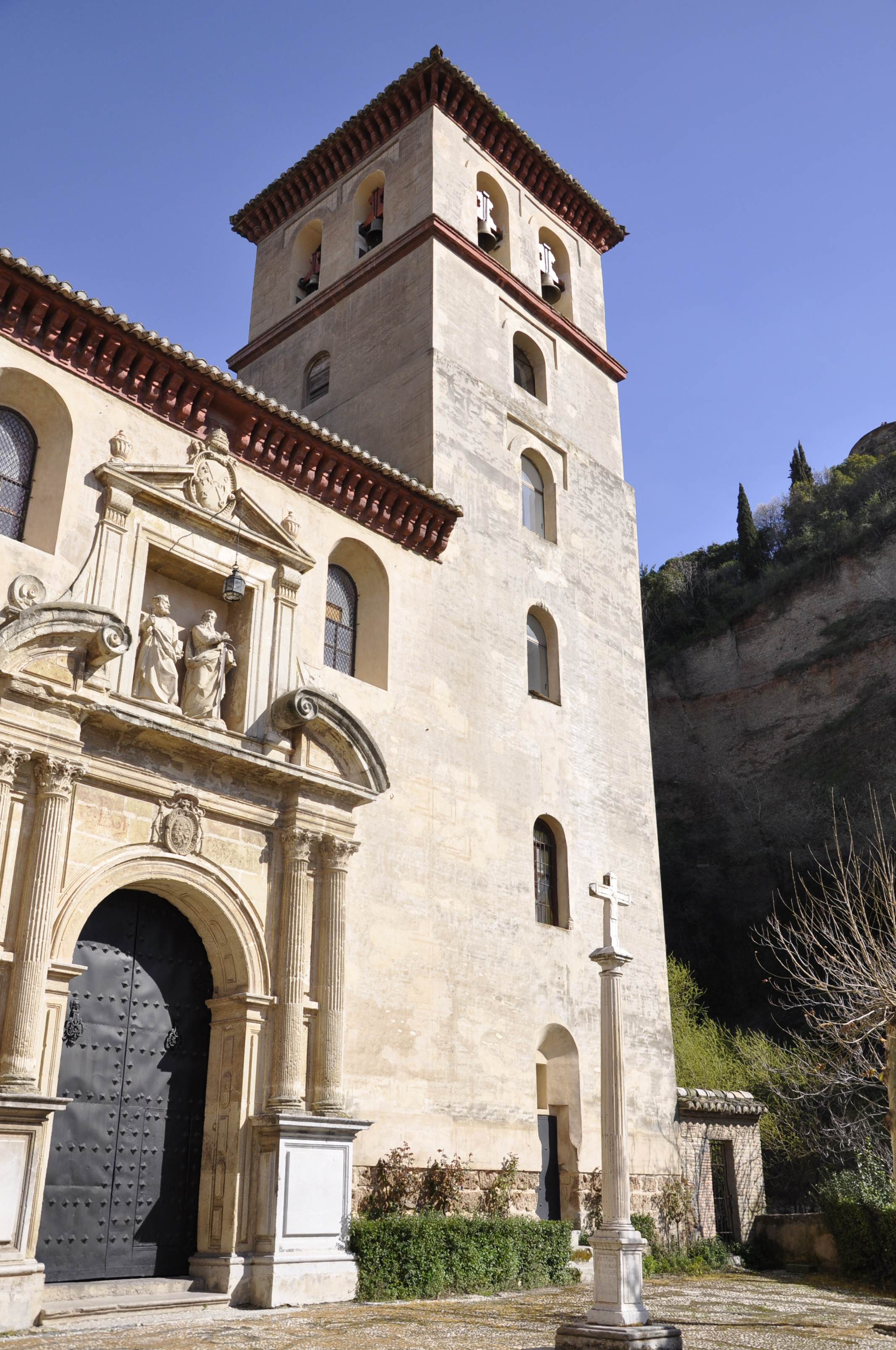 Iglesia de San Pedro y San Pablo in Granada, Spanje